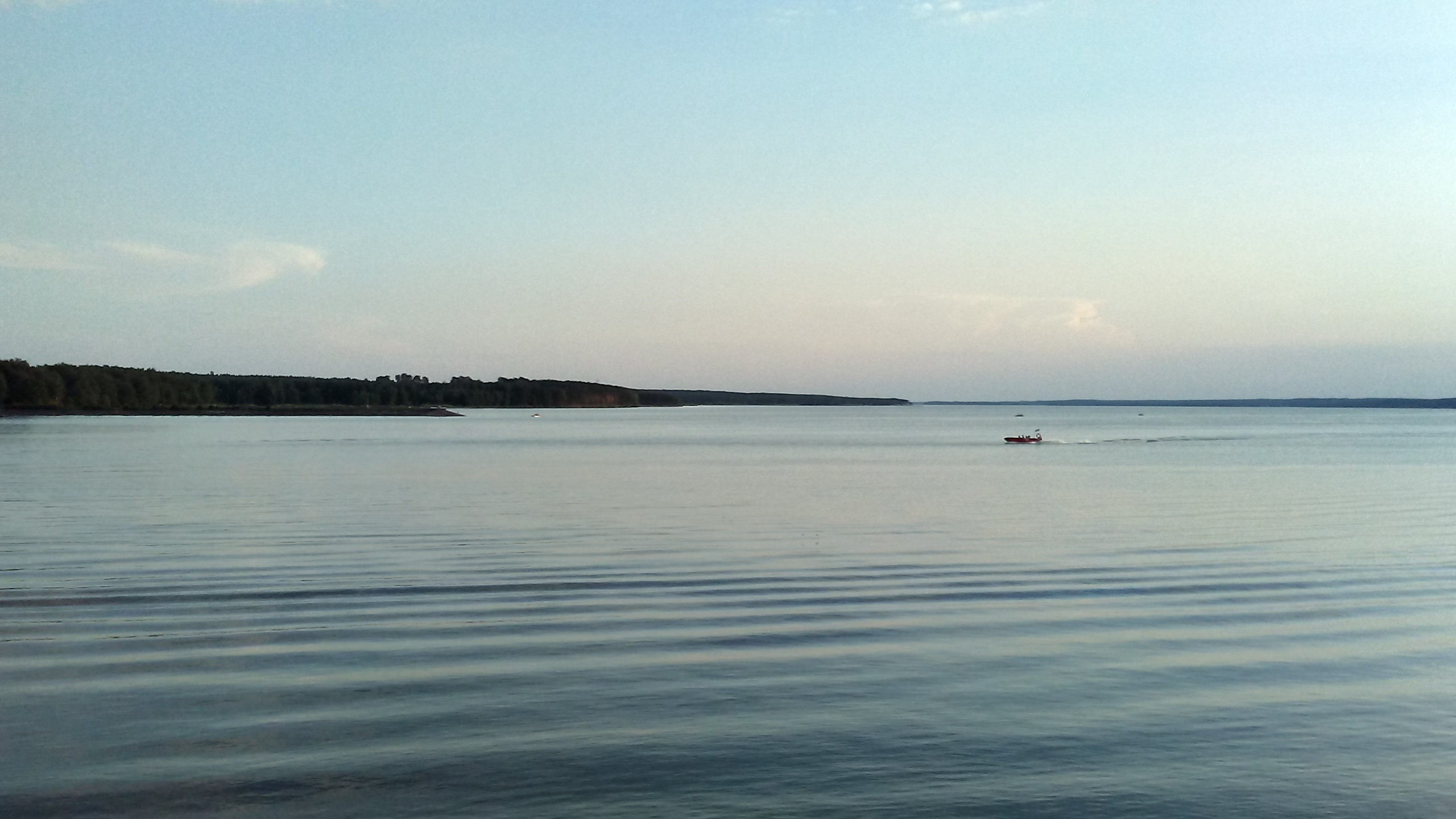 Zalew Sulejowski, widok od strony Tomaszowa Mazowieckiego, maj 2018 r.